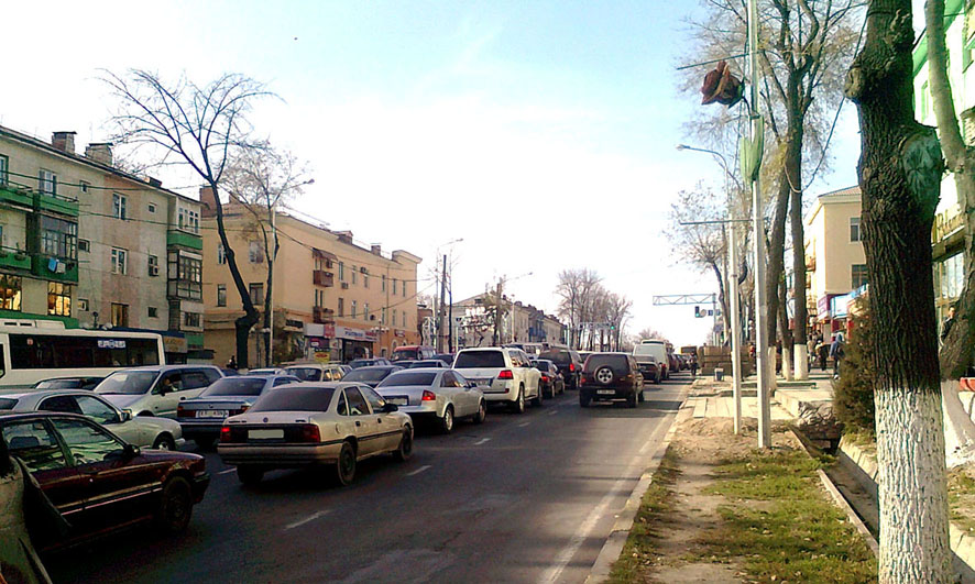 Улчиное движение в г. Шымкент (час-пик).